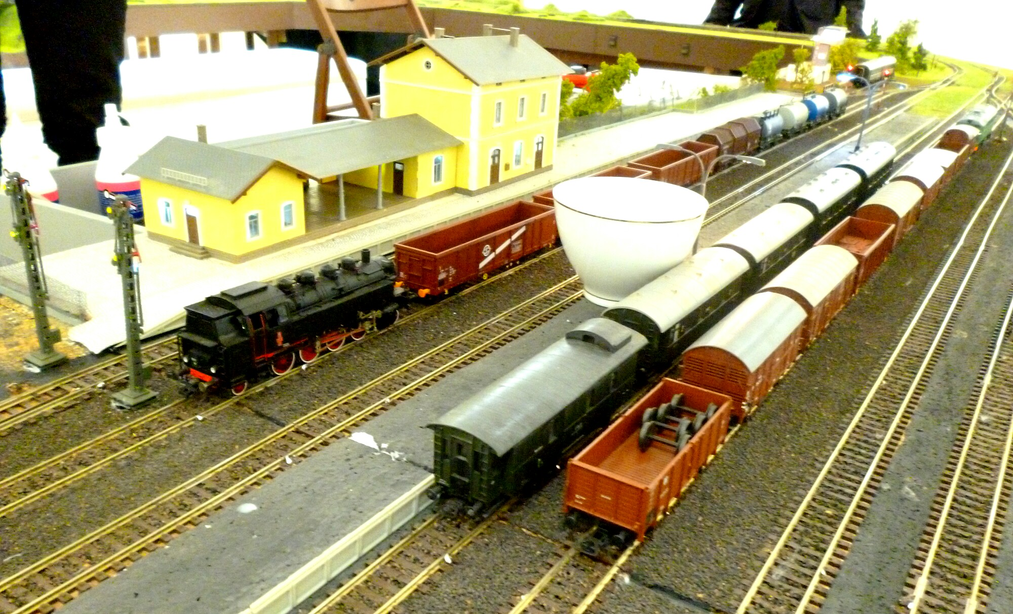 Makieta kolejowa z stacja, wagony, lokomotywa, skala 1:87